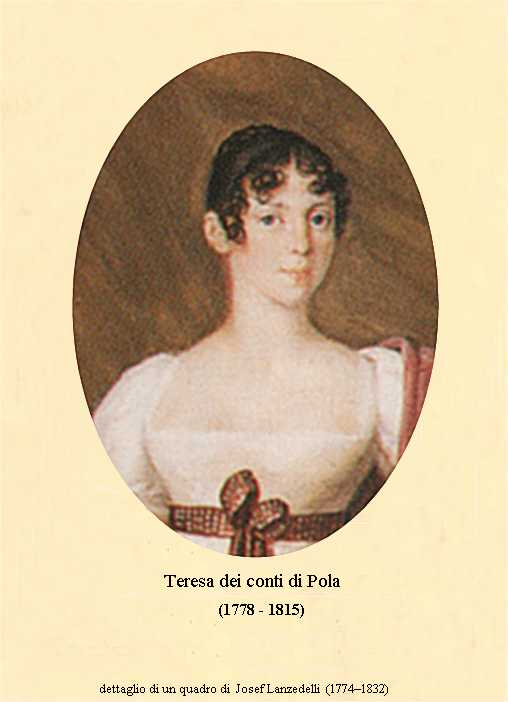 Teresa Pola